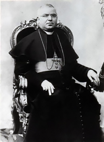 fotografia del card. Donato Maria Dell'Olio